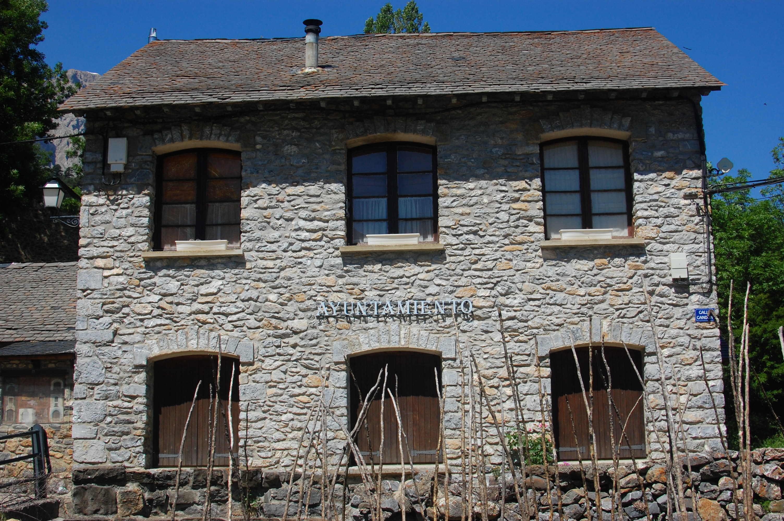 Aragonés: Casa d'o Lugar de Piedrafita